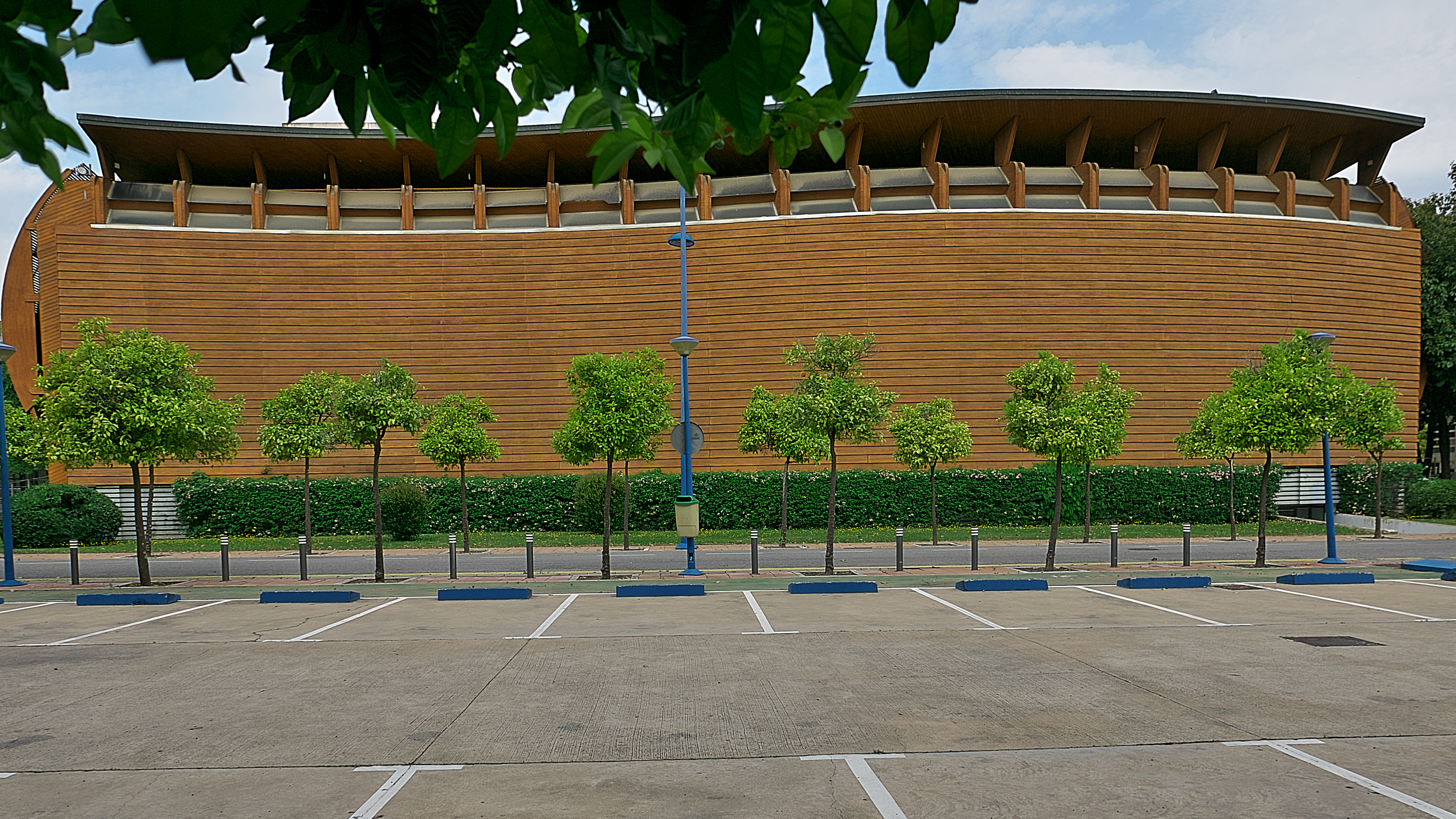 Antiguo Pabellón de Chile. Fachada a la calle Max Planck del Parque Científico y Tecnológico Cartuja. Un edificio de Germán del Sol Guzmán y José Cruz Ovalle.